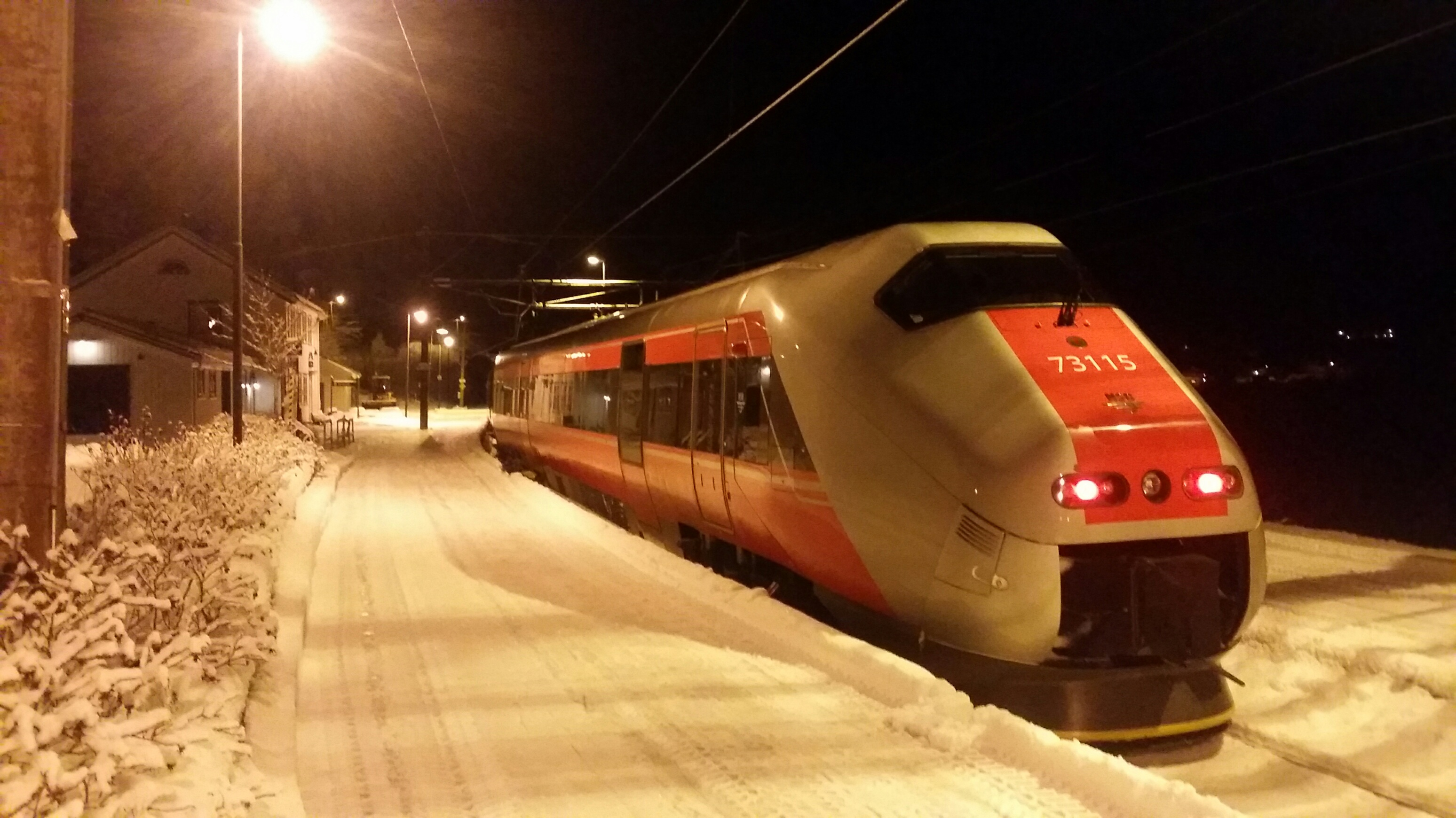 Tidlig vintermorgen på Gjerstad stasjon. Første tog til Oslo.